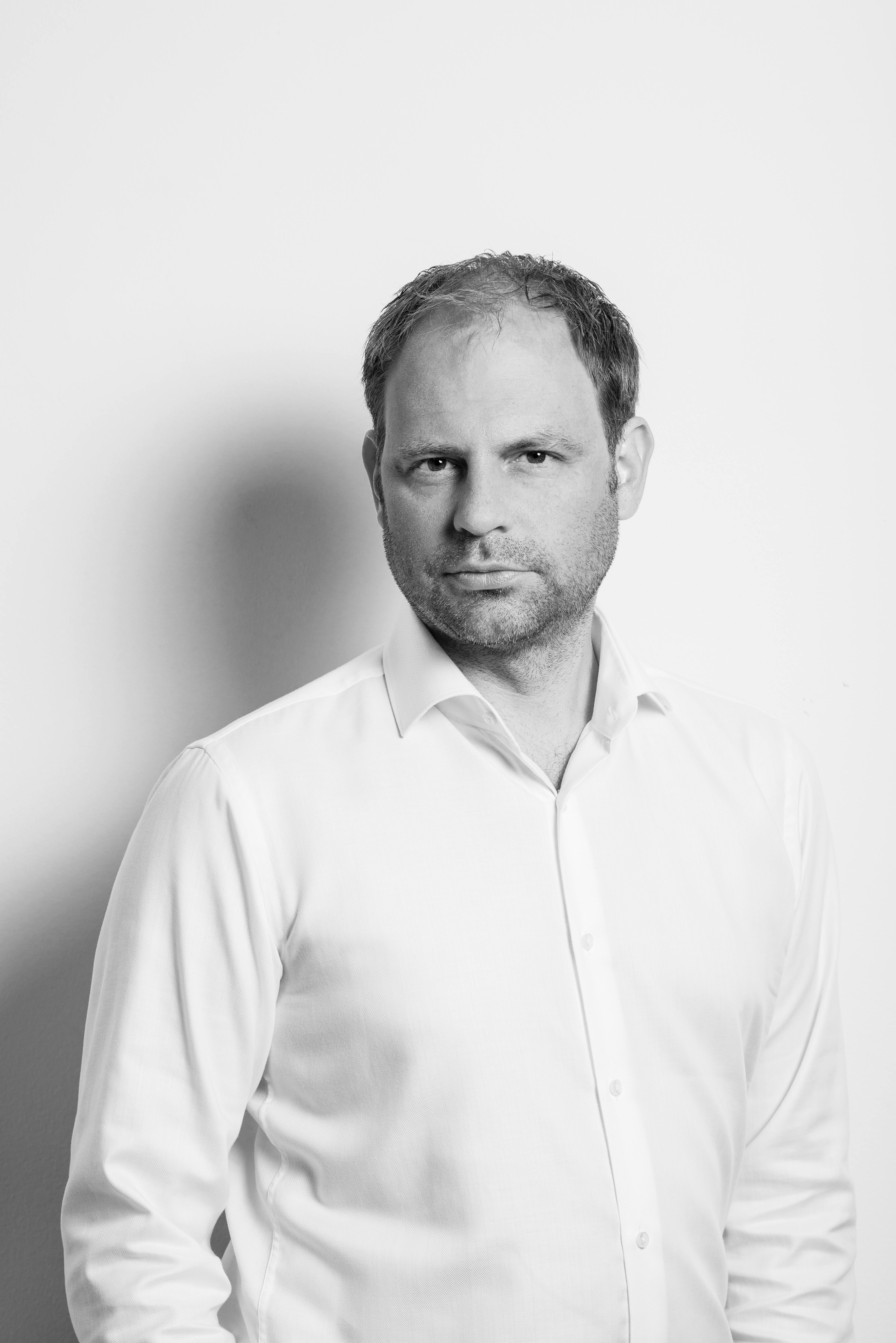 Christoph Meyer